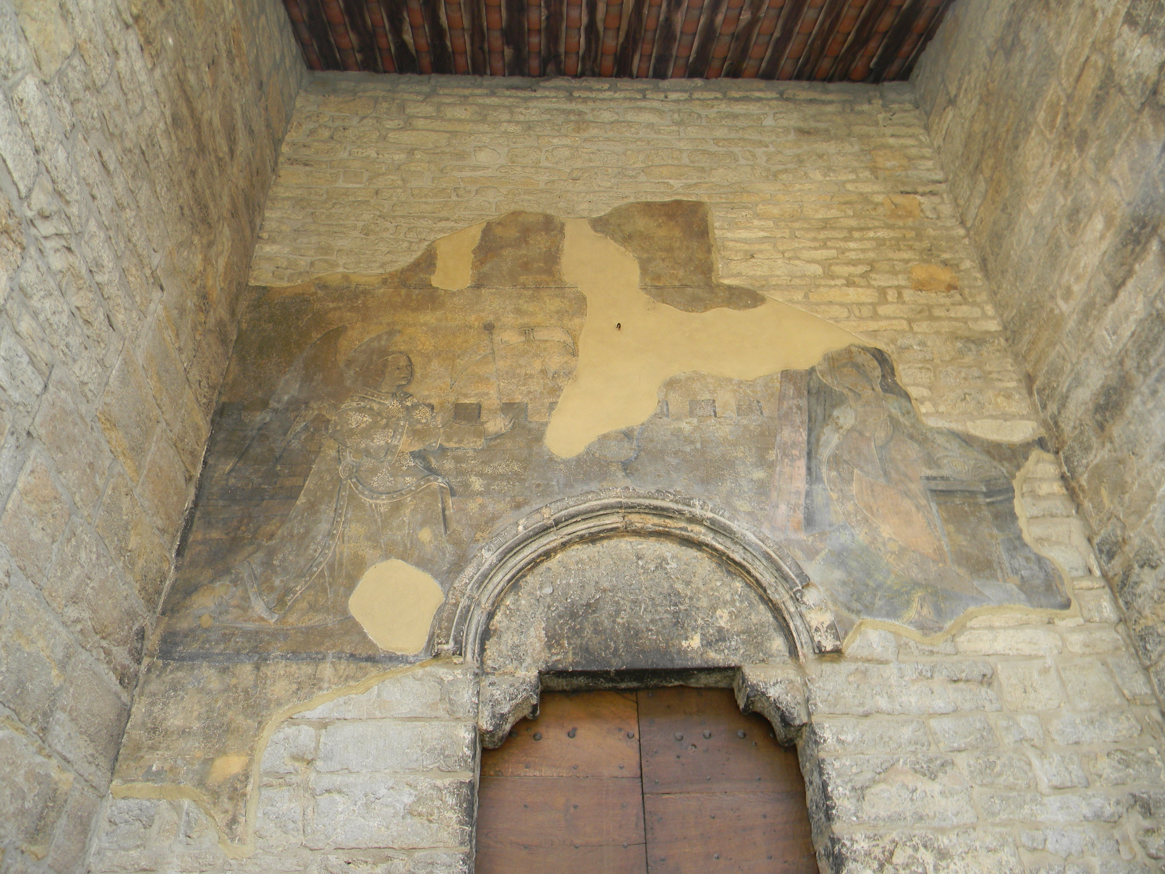 Arbois (Jura, France), église St Just, fresque de l'Annonciation du XVe siècle.